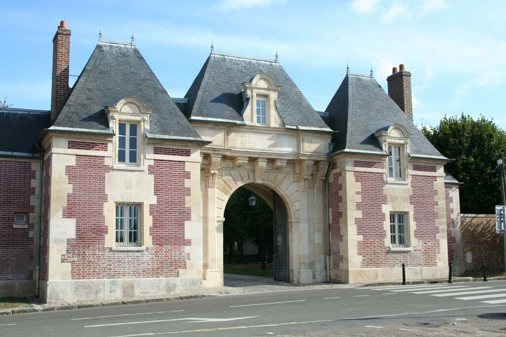 Pvillon d'entrée du parc de la mairie à Ecquevilly - Yvelines (France)